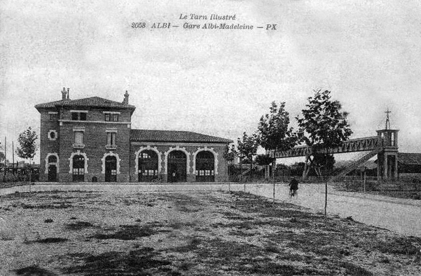 Bâtiment voyageurs de la gare d'Albi-Madeleine vers 1914